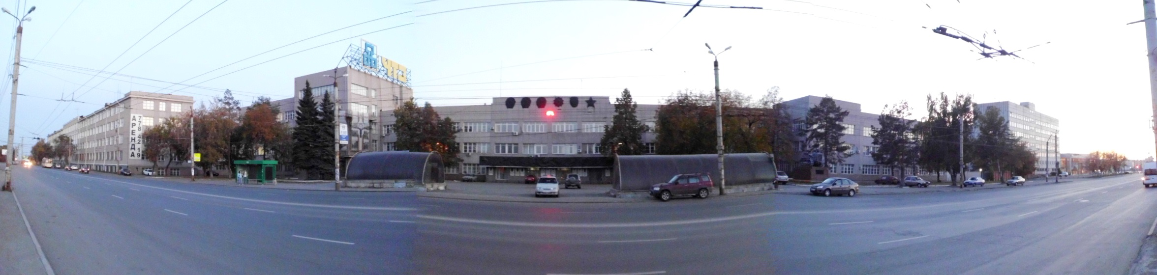 Здание заводоуправления ЧТЗ, которое посетили деятели государства и работали видные ученые: проспект Ленина, 3, Челябинск, Челябинская область. Панорамный снимок.